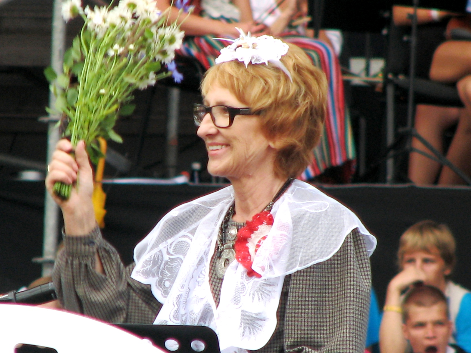 Lydia Rahula pärast poistekooride poolt laulu "Maateadus" esitamist